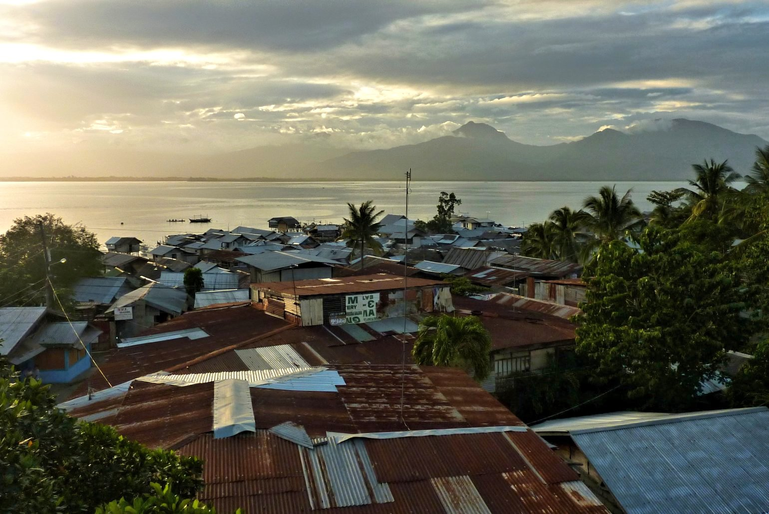 Puerto Princesa, Palawan, Philippines